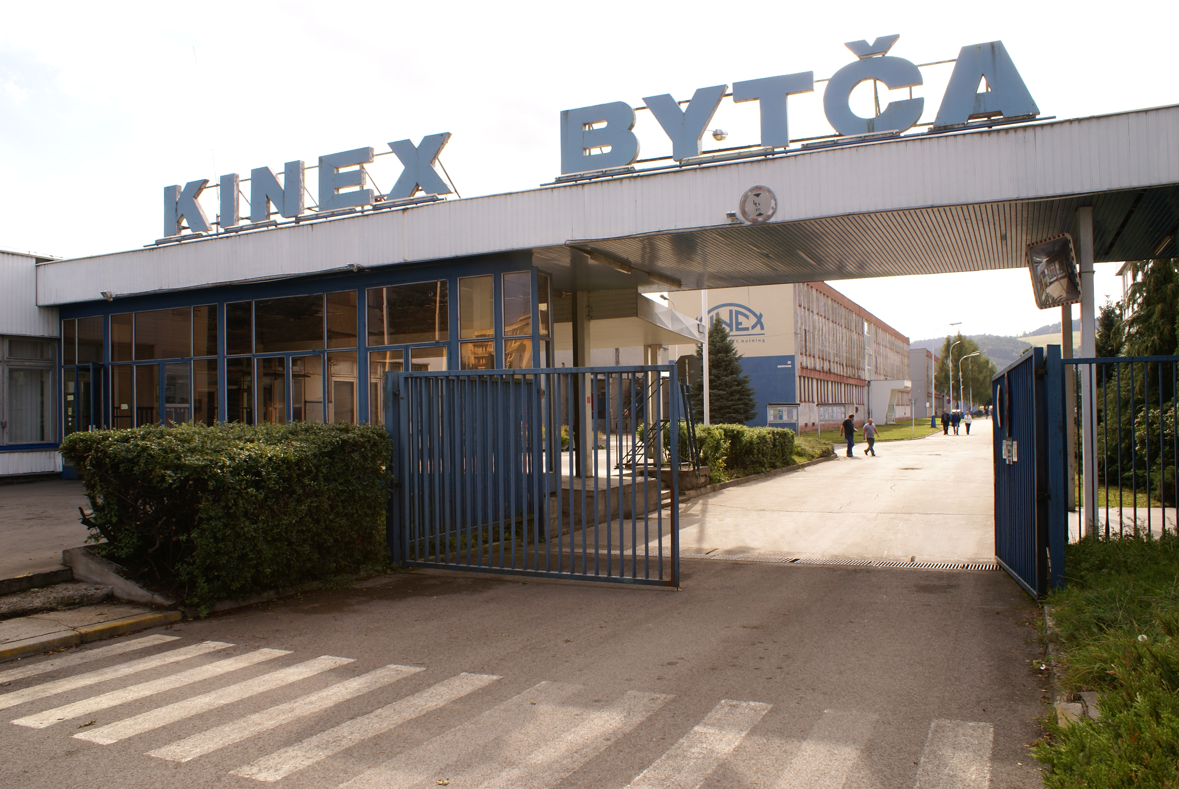 Vstupná brána